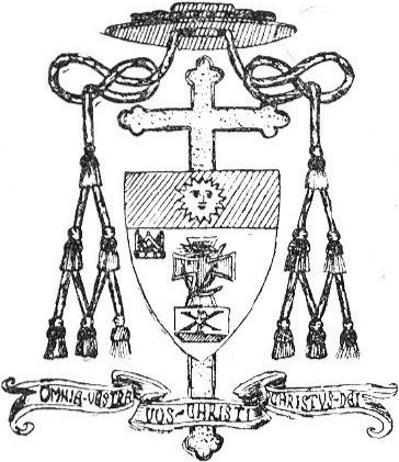 Escudo episcopal de Enrique Rau, obispo argentino. Primer obispo de Mar del Plata